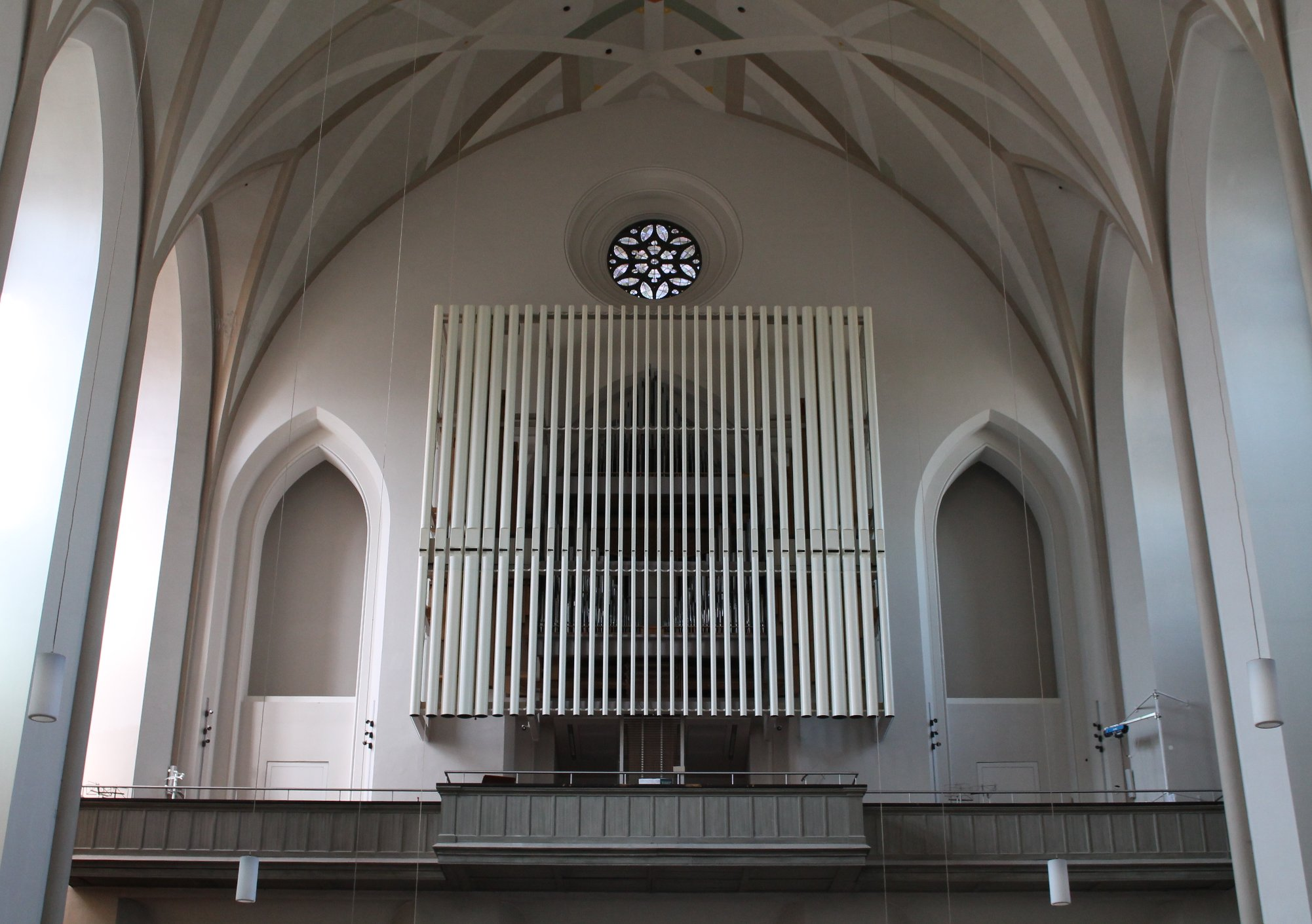 Orgel von St. Johann Baptist in München (Haidhausen)